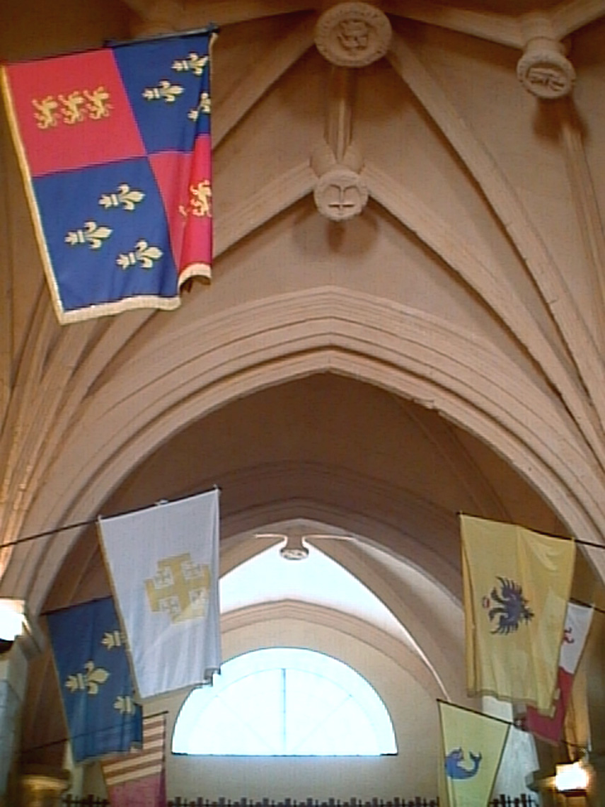 Volte a crociera della chiesa di Santa Maria del Monte, Cagliari